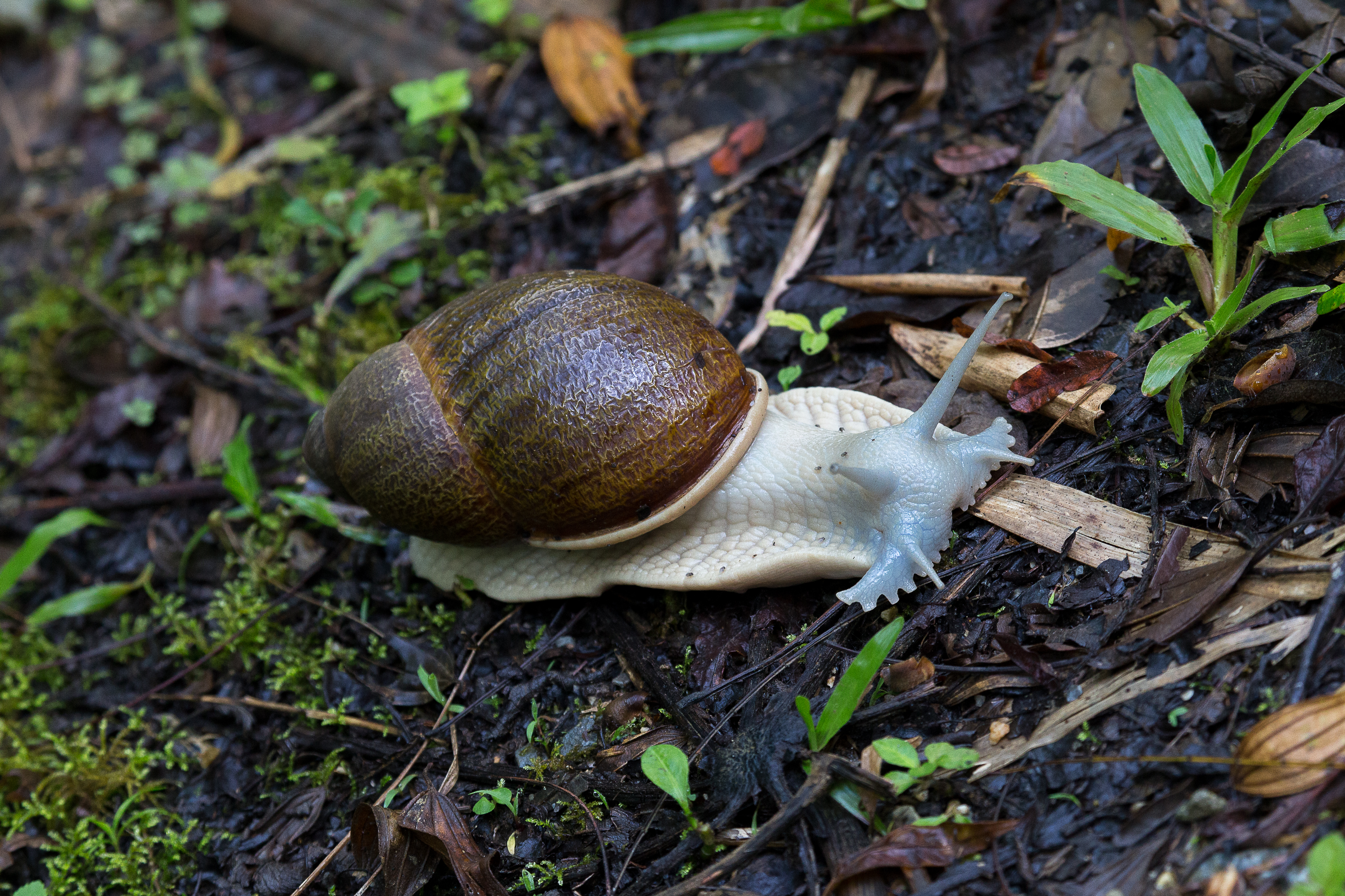 Caramujo no Parque Estadual Intervales